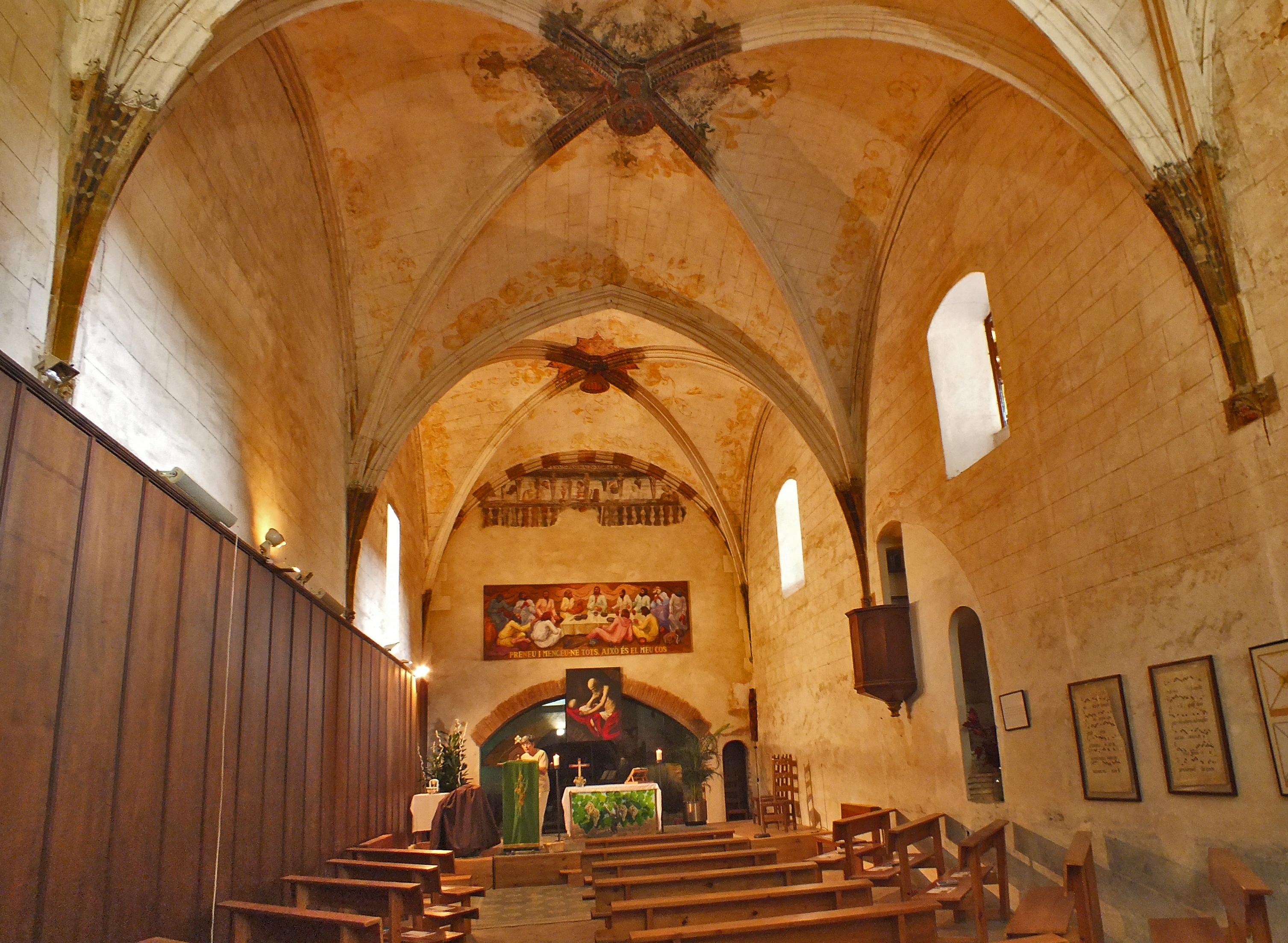 Refectori de Sant Jeroni de la Murtra